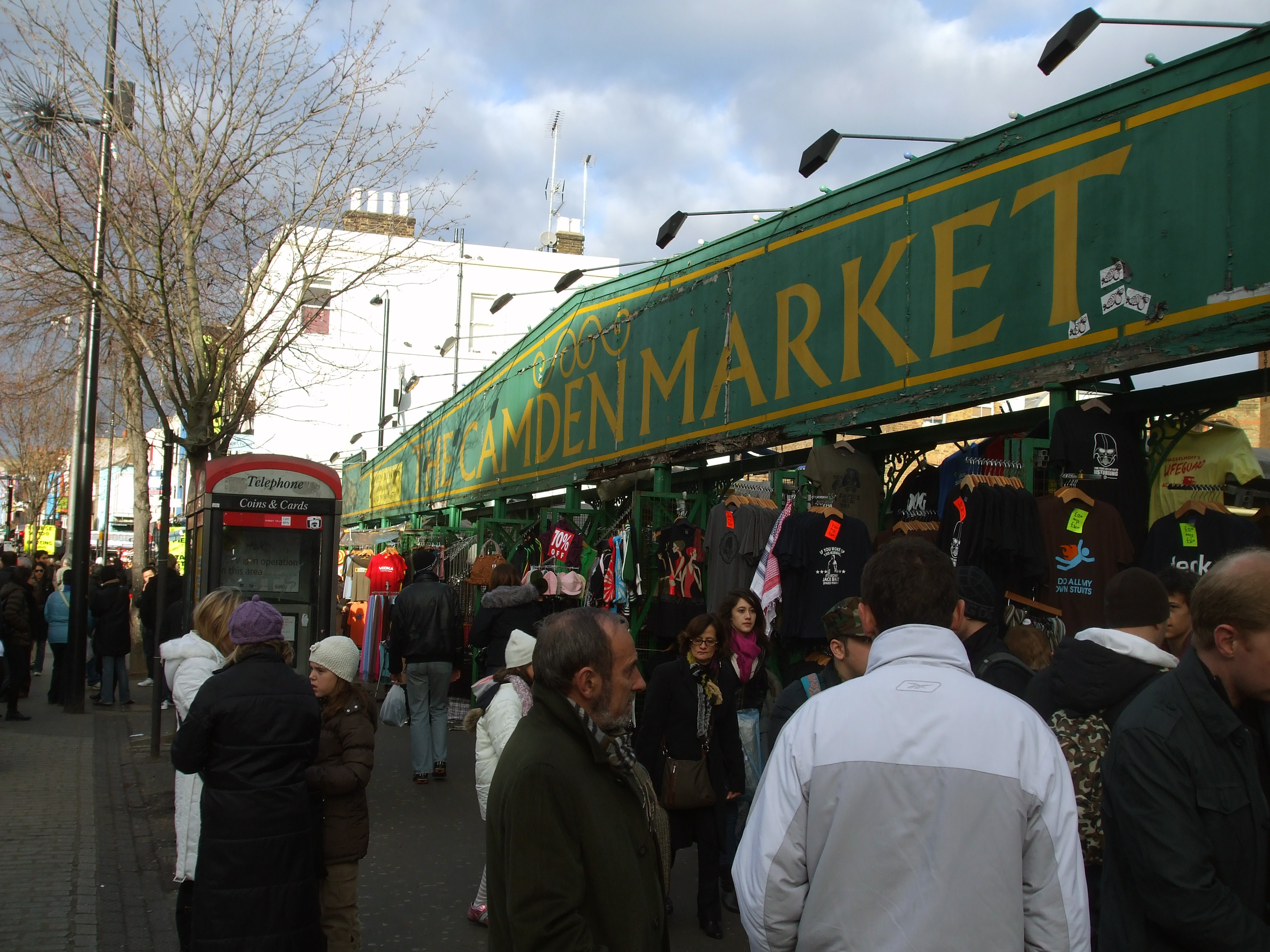 Camden Market